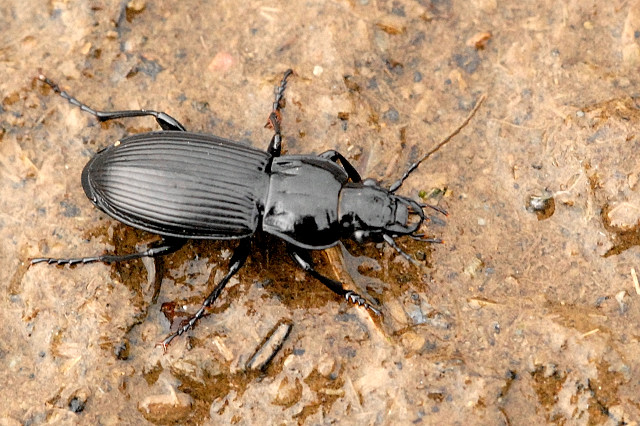 Pterostichus niger from Commanster, Belgian High Ardennes .